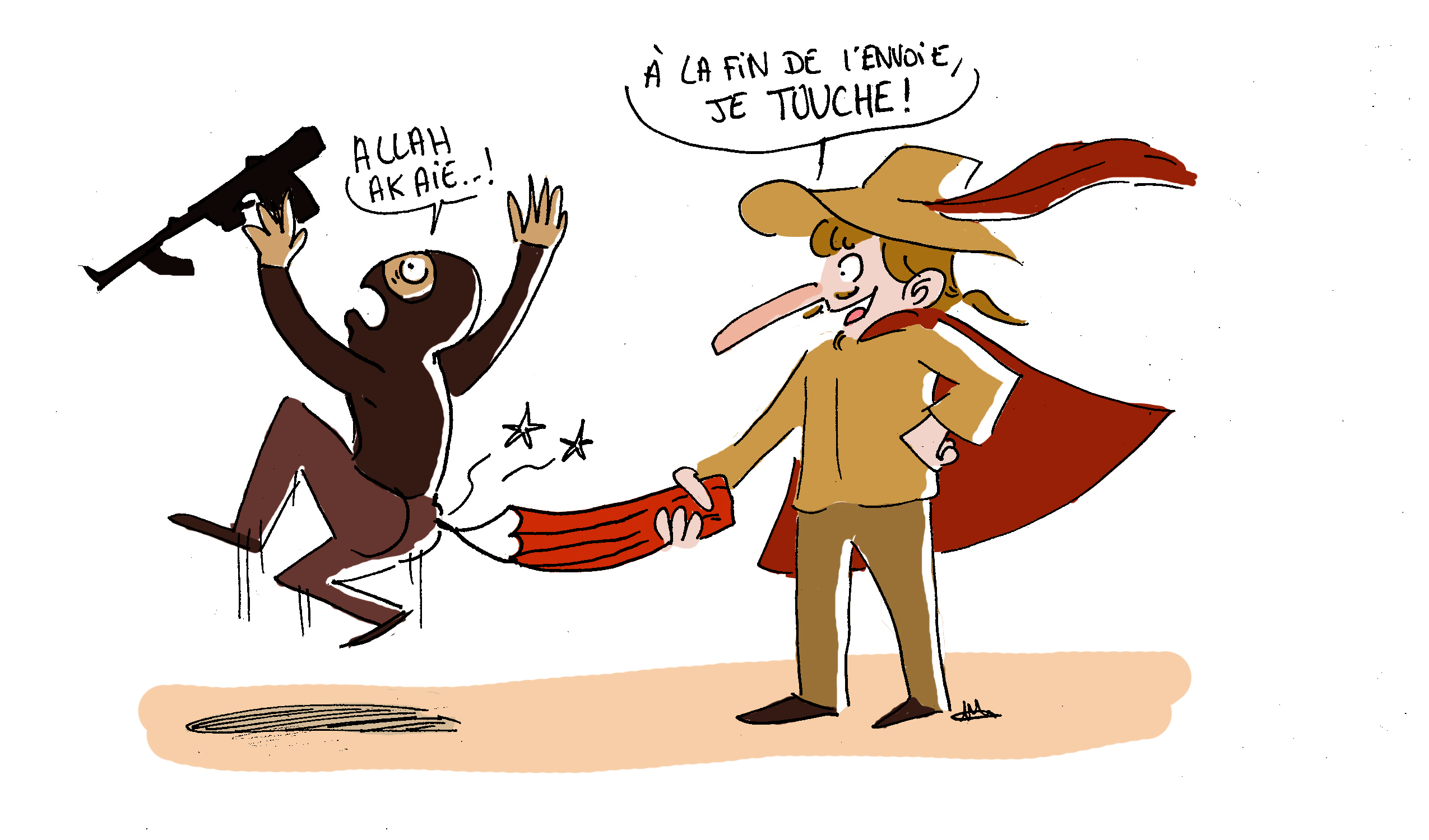 Nous sommes Charlie, par Mathilde Bouvault - Les étudiants du CESAN rendent hommage